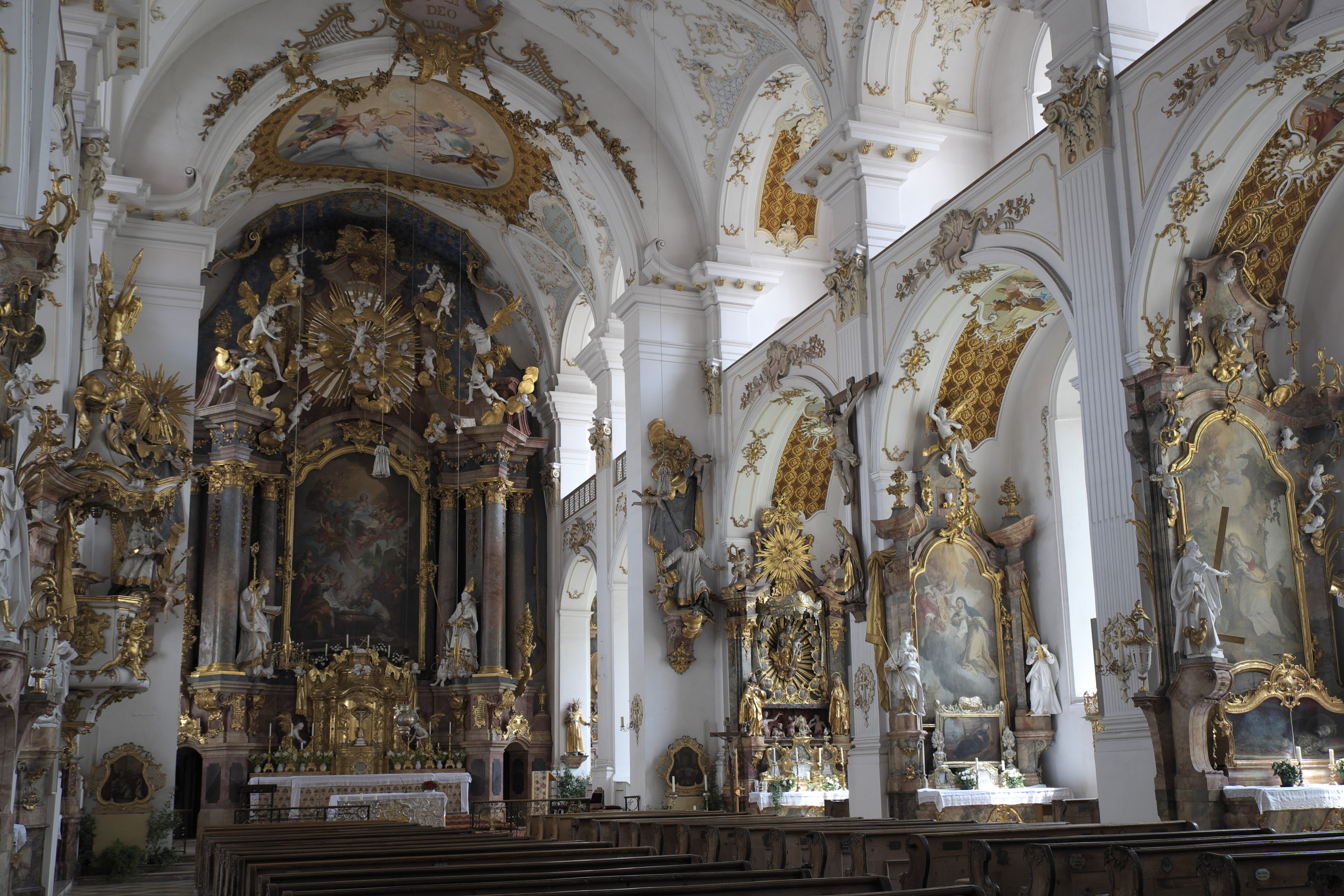 Kirche Mariä Himmelfahrt des Klosters Dietramszell, einem Ortsteil der Gemeinde Dietramszell im Landkreis Bad Tölz-Wolfratshausen (Bayern/Deutschland), Gedenktafel für Opfer des Deutsch-Französischen Krieges